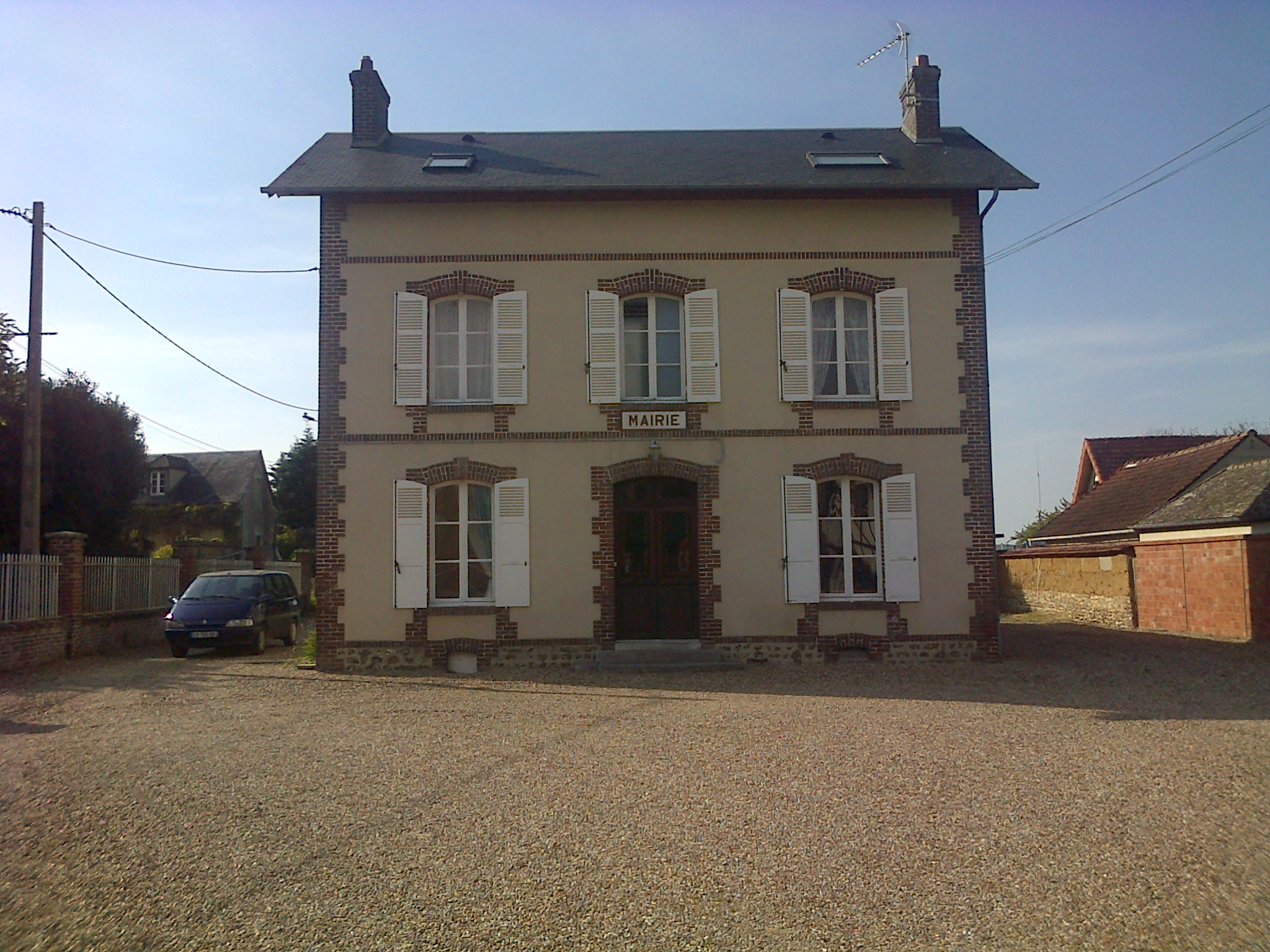 Mairie de Sainte Marie de Vatimesnil